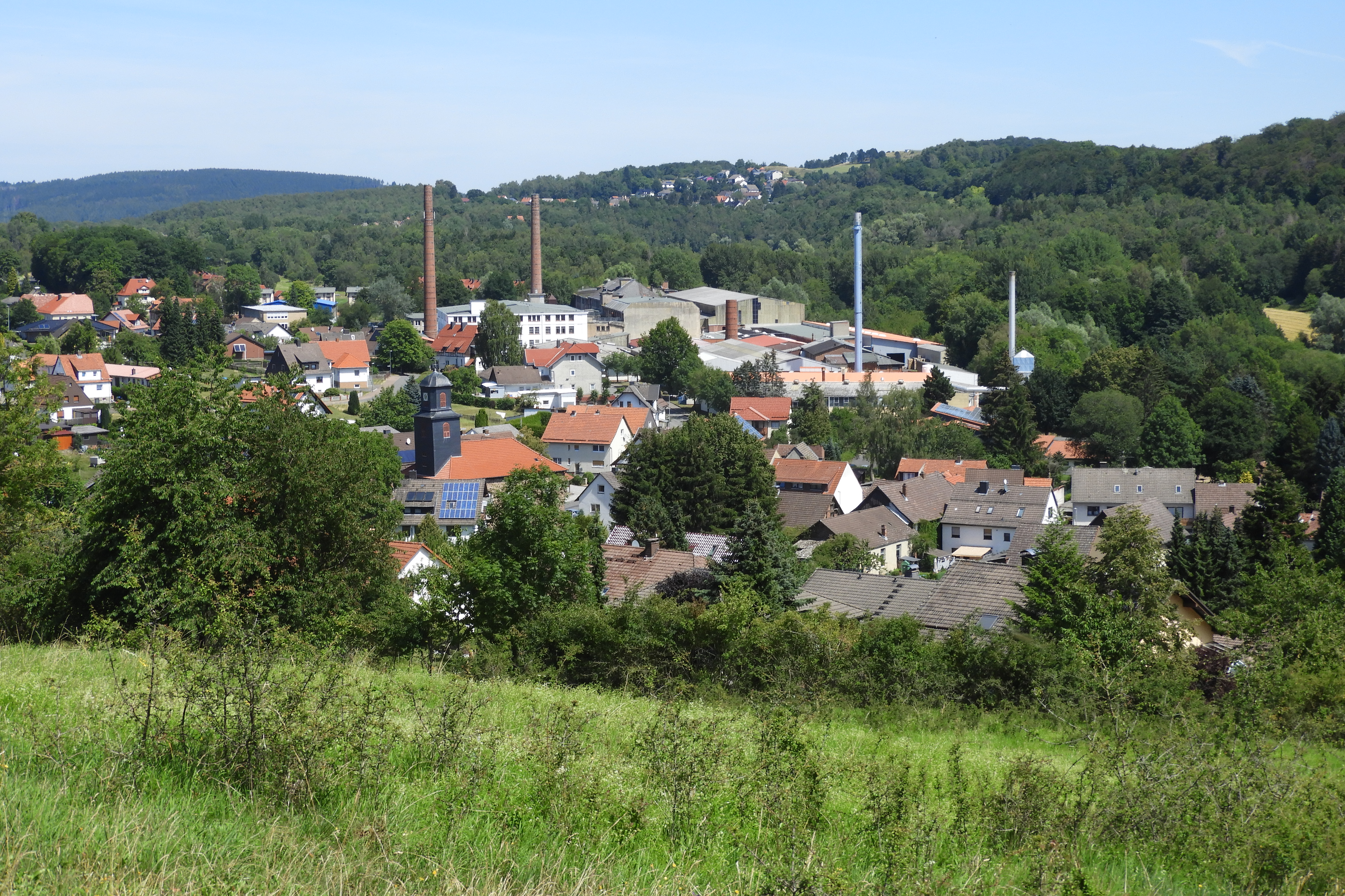 Der Rösberg erhebt sich mit einer Höhe von 539,4 m aus der Mittelgebirgslandschaft des Kaufunger Waldes, südöstlich von Rommerode, einem Ortsteil der Stadt Großalmerode im nordhessischen Werra-Meißner-Kreis. Er wird geprägt von Kalkmagerrasen, Wirtschaftsgrünland, Äckern und Wäldern, die sich kleinräumig miteinander abwechseln und ein vielgestaltiges Landschaftsbild ergeben. Wegen dem Vorkommen von besonders schutzwürdigen Tier- und Pflanzenarten auf seinen Grünlandflächen, wurde er als ein Flora-Fauna-Habitat-Gebiet zu einem Bestandteil des europaweiten Schutzgebietssystems Natura 2000, das eine länderübergreifende Vernetzung von bedrohten Lebensräumen zum Ziel hat. Auf den Halbtrockenrasen, die durch die Bewirtschaftung des Menschen entstanden sind, finden sich mehr als sechzig verschiedene Pflanzenarten, von denen viele als selten und gefährdet angesehen werden.